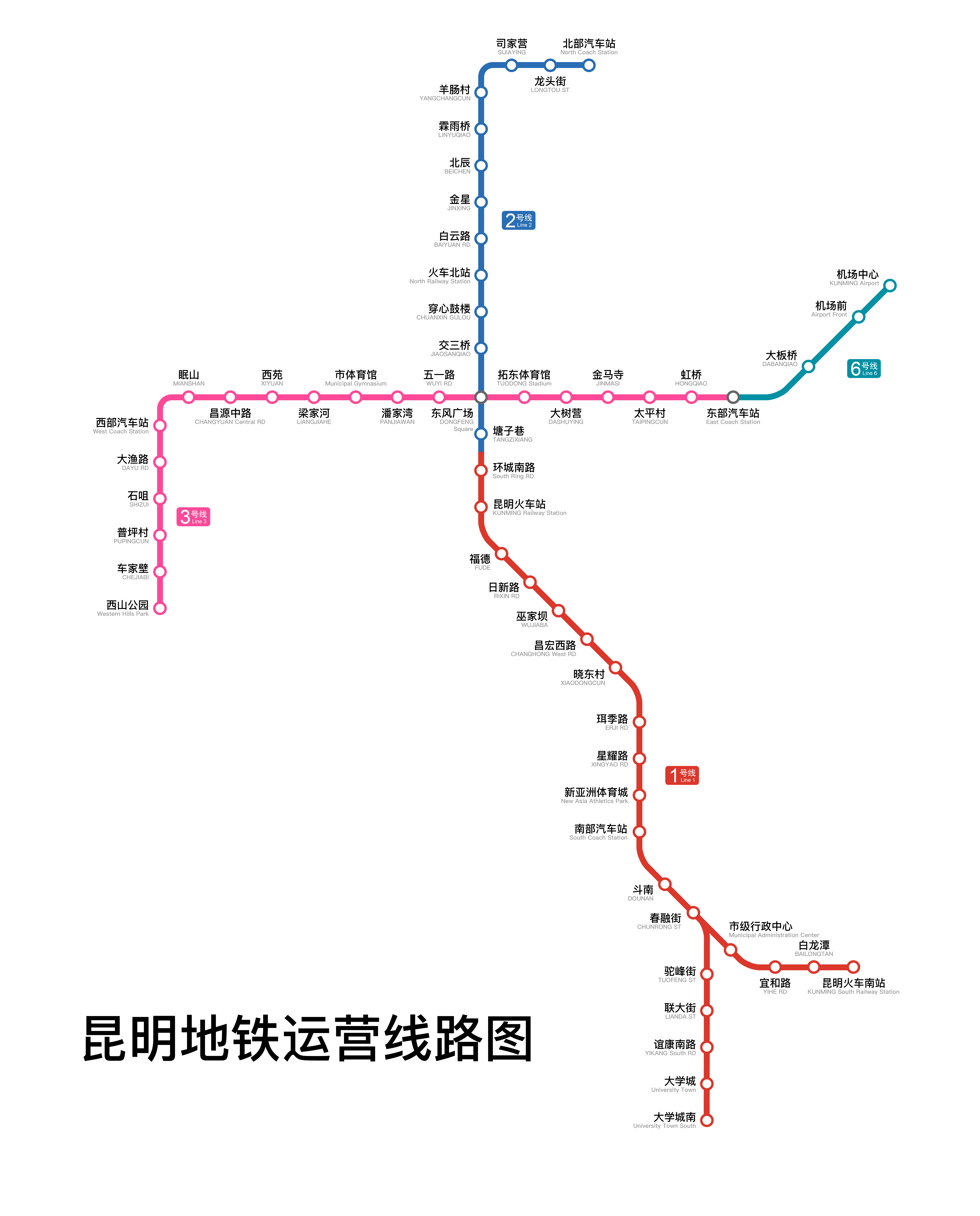 昆明地铁线路图